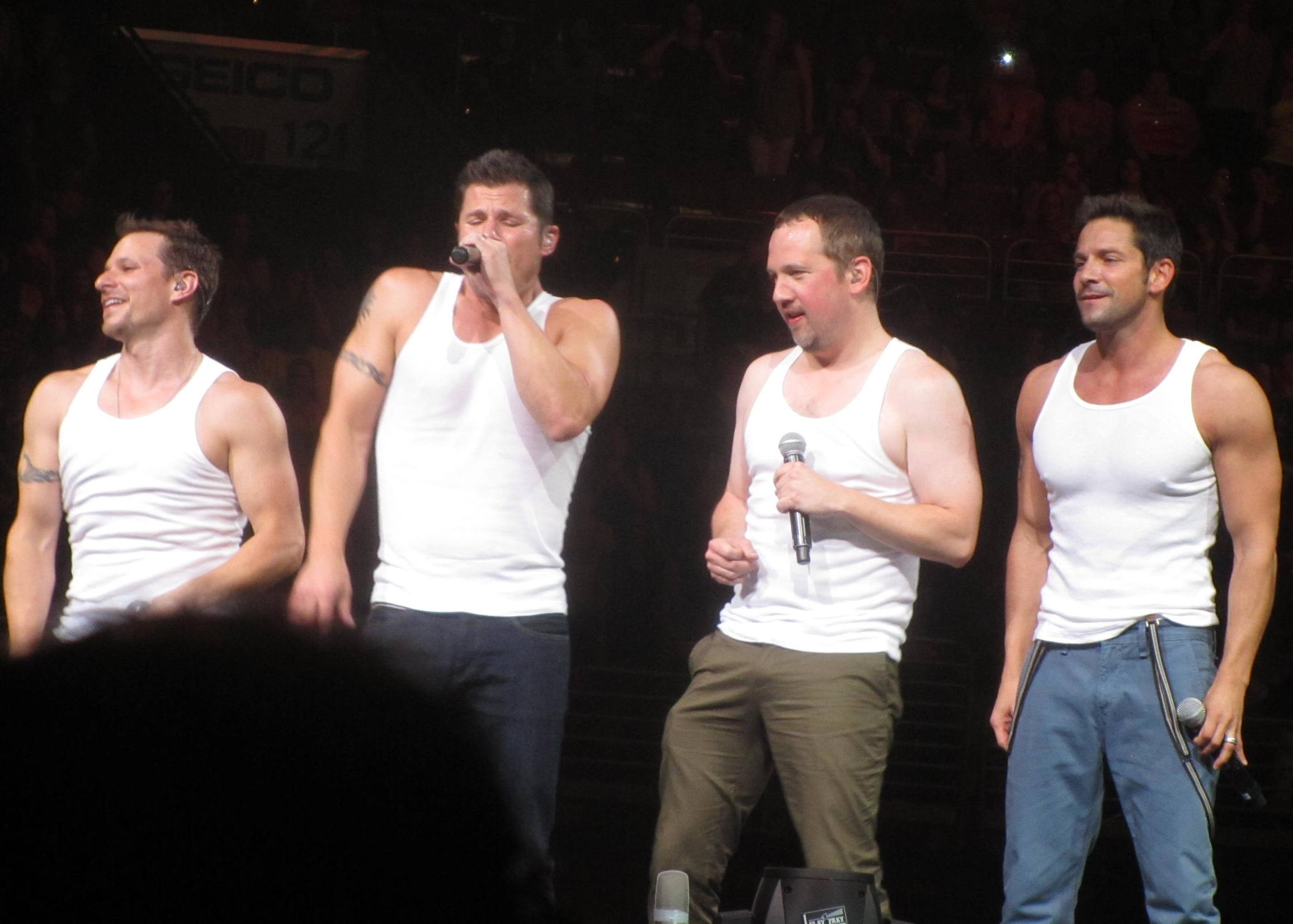 98 Degrees